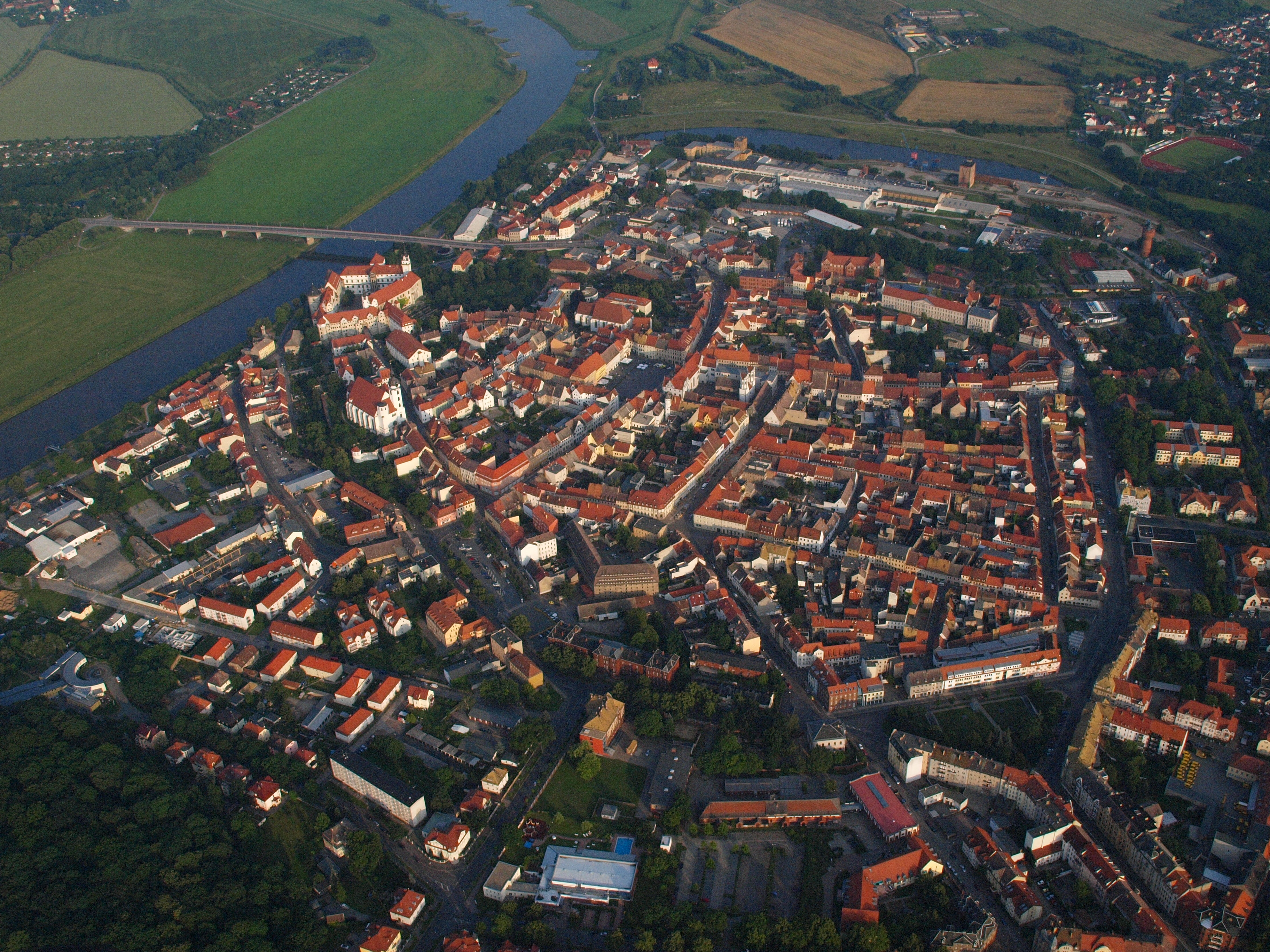 Torgau aus nordwestlicher Richtung - Denkmalschutzgebiet Altstadt Torgau.